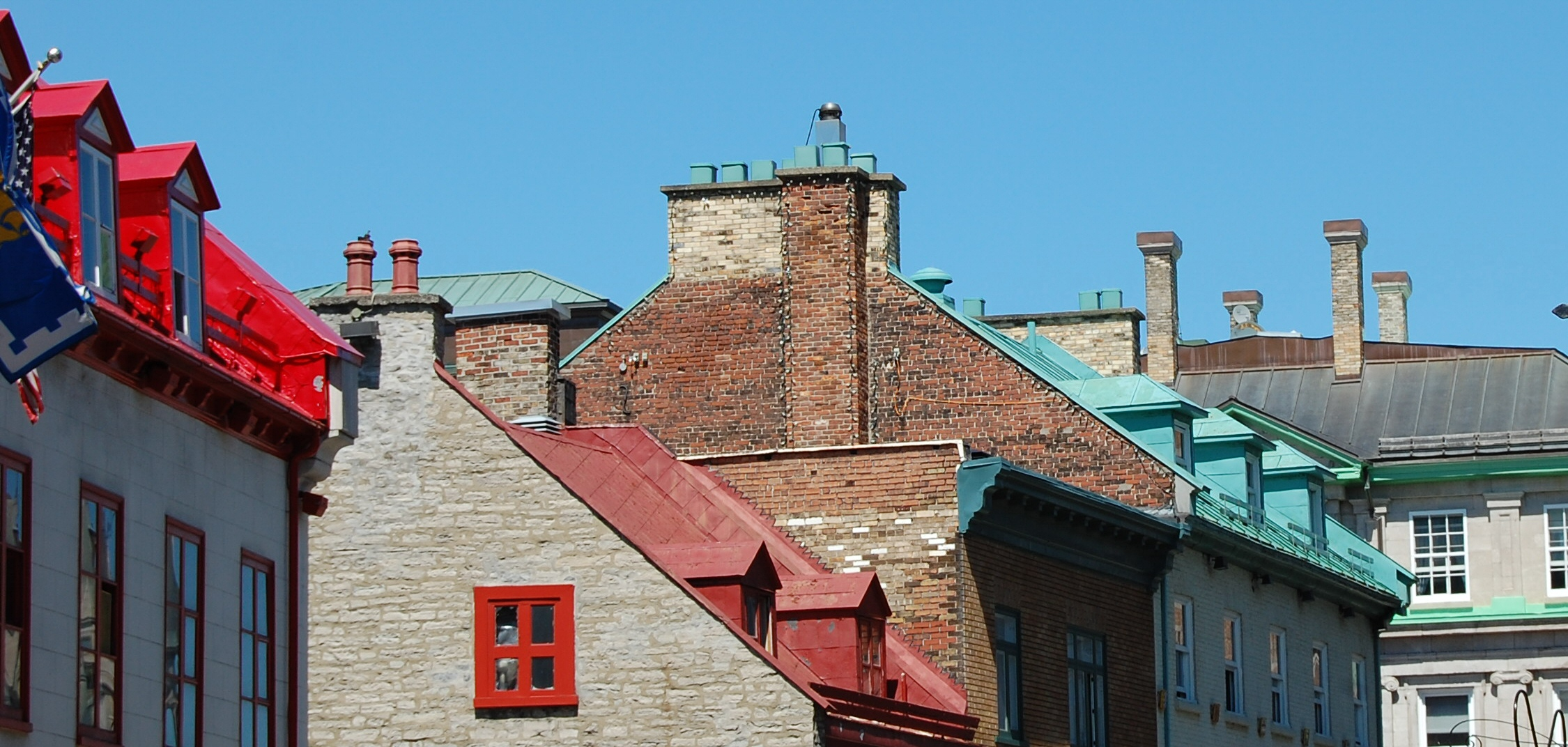 Détail architectural du vieux Québec, Québec